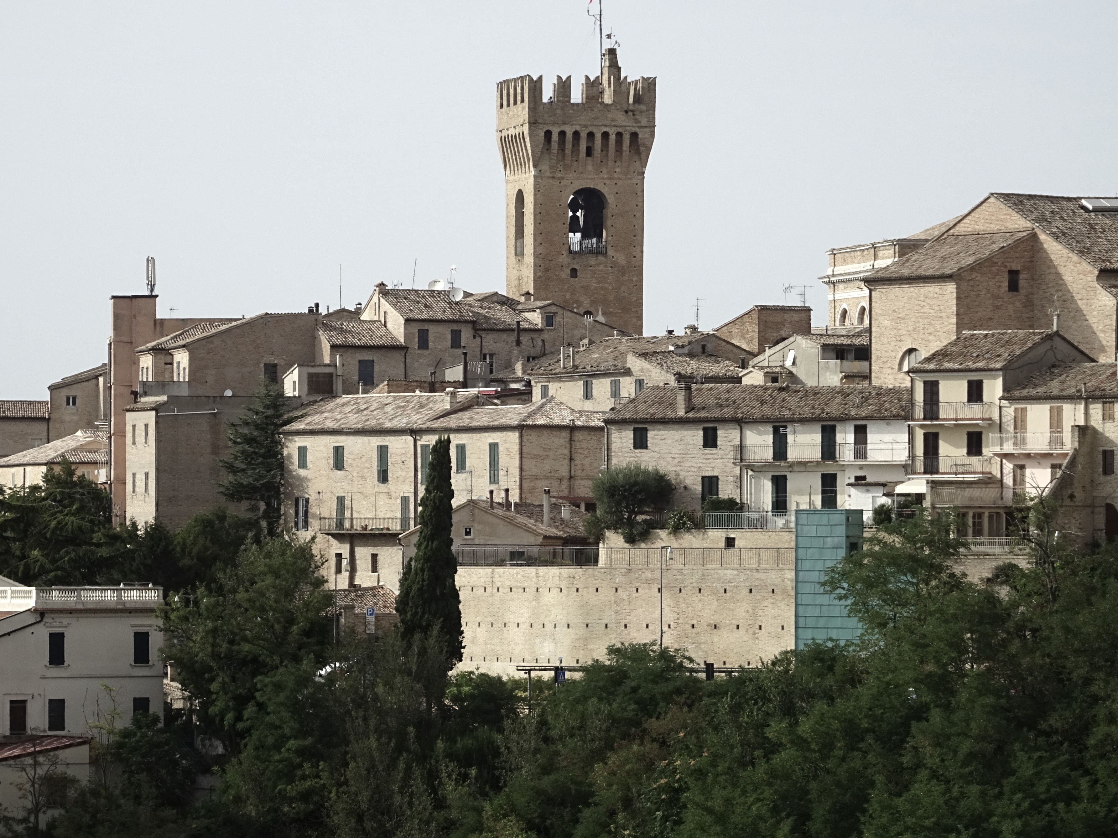 Vue de Recanati